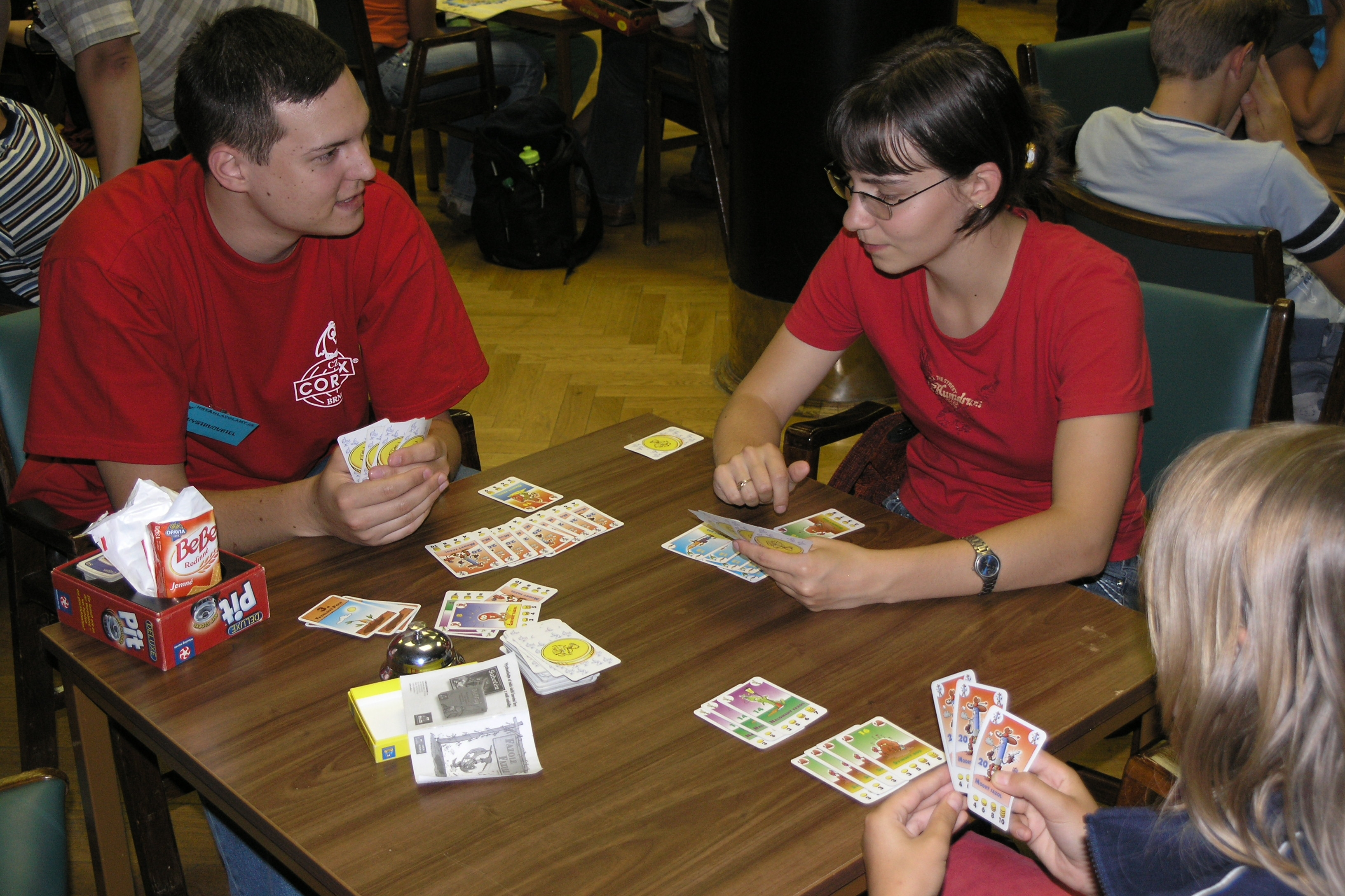 Hry a hlavolamy 2008 - festival her a hlavolamů v Praze, Holešovicích